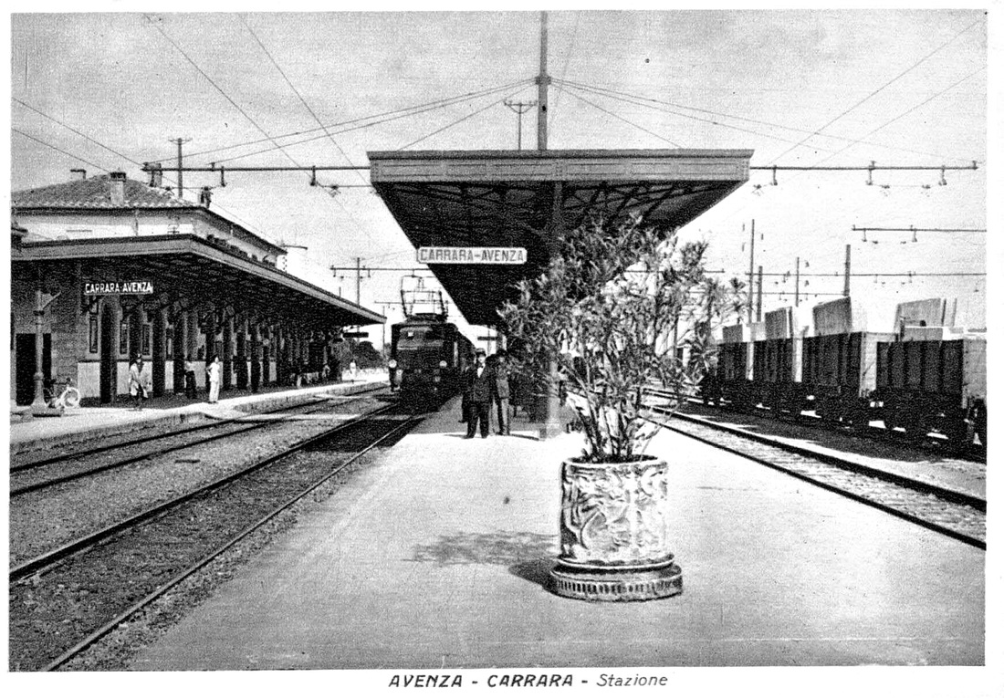 La stazione di Avenza durante il periodo della trazione trifase, dopo la ristrutturazione del fabbricato viaggiatori e della sostituzione delle pensiline.